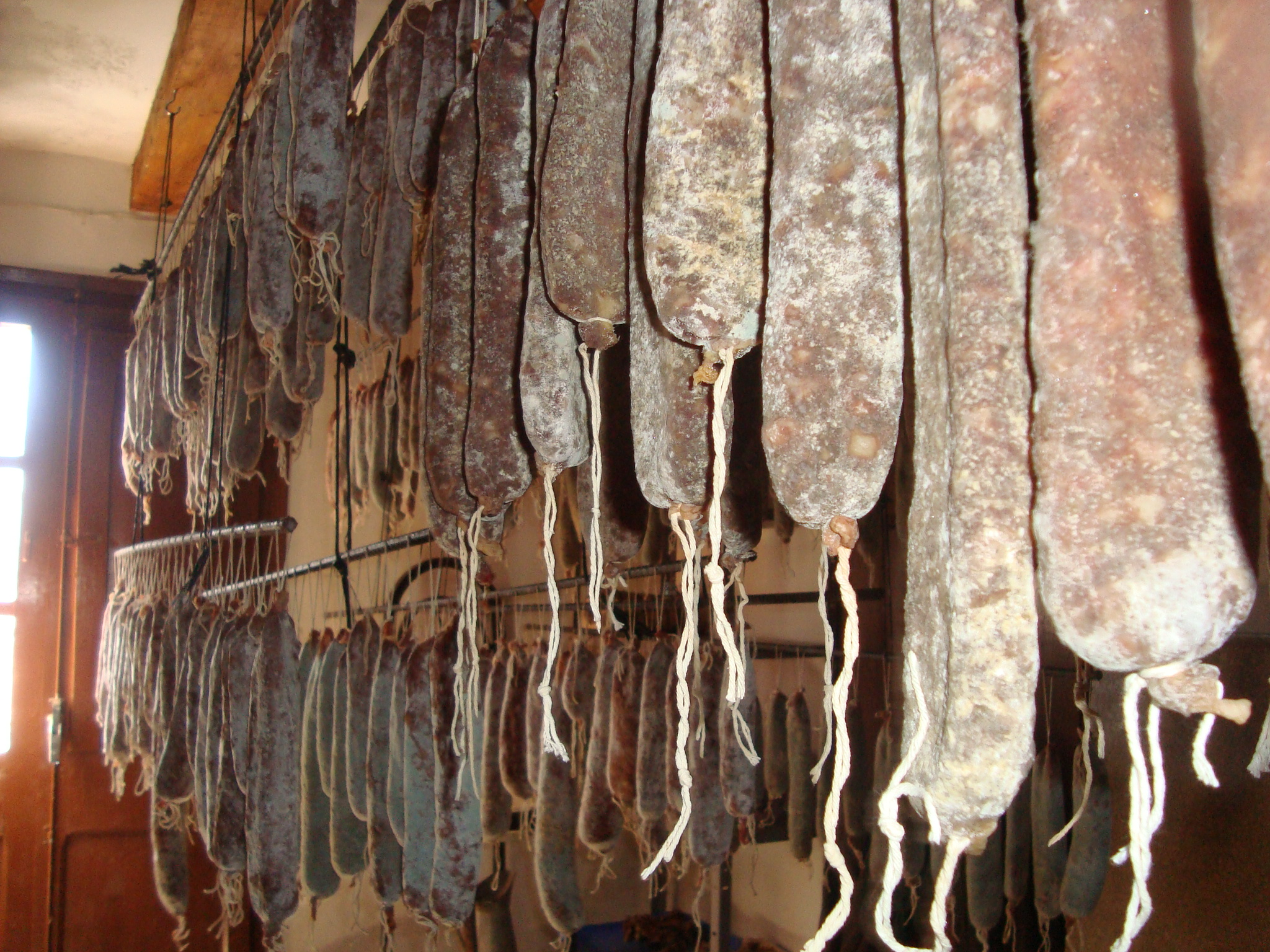 Embutido típico del Pirineo Lleida